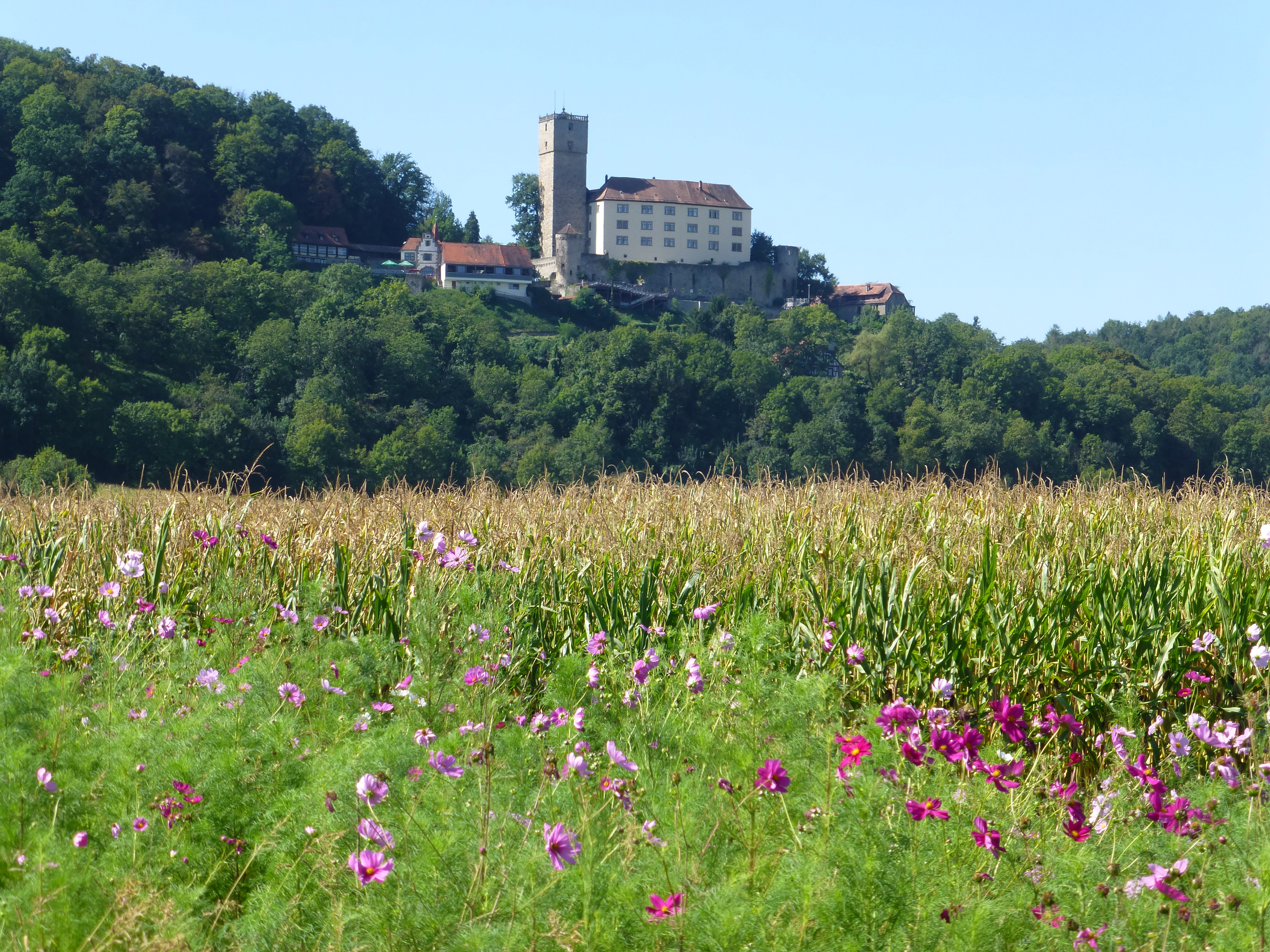 Burg Guttenberg bei Neckarmühlbach